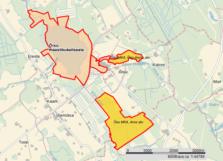 Õisu MKA Maa-ameti kaardil.